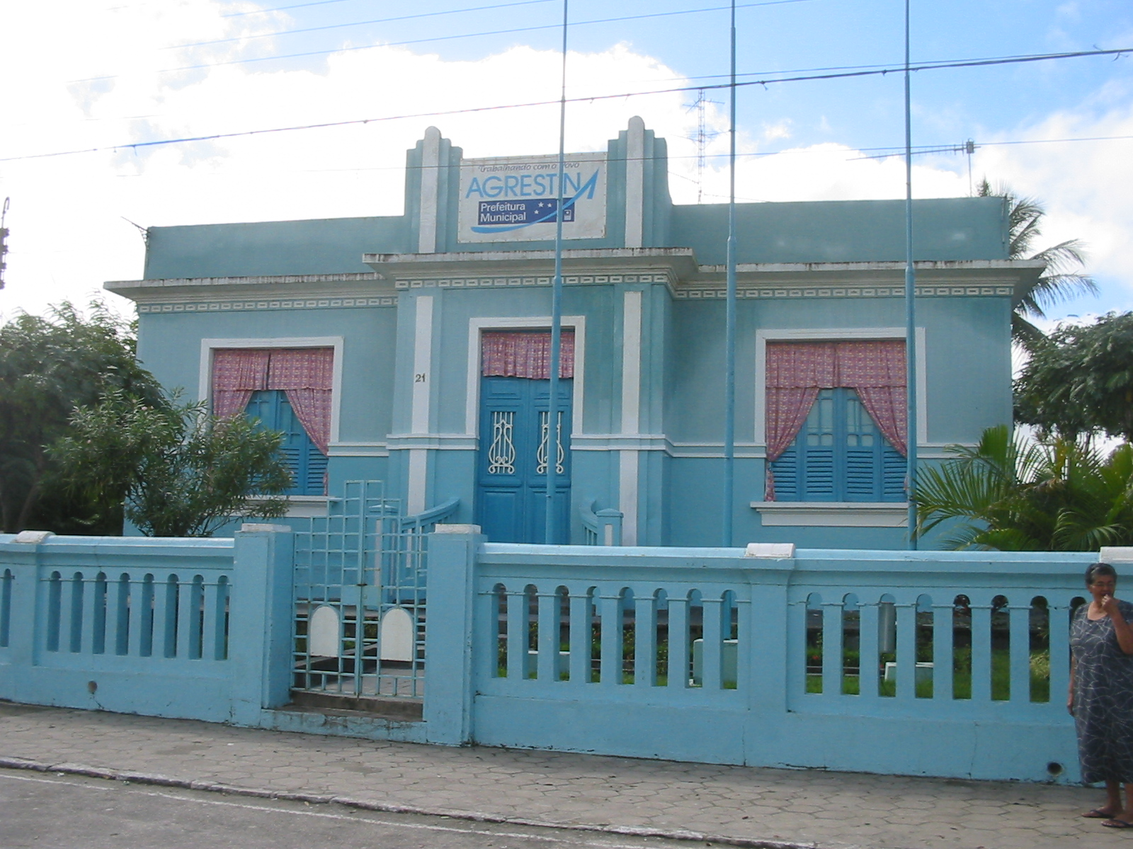 Prefeitura de Agrestina (Pernambuco), Brasil. Inaugurada em 1937 na administração do Prefeito Américo de Oliveira Costa e reformada em 1979 e 1993. Agrestina (Pernambuco), Brazil. Mayor's Office.